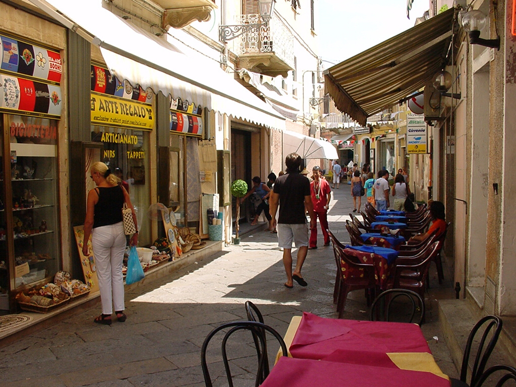 La Maddalena